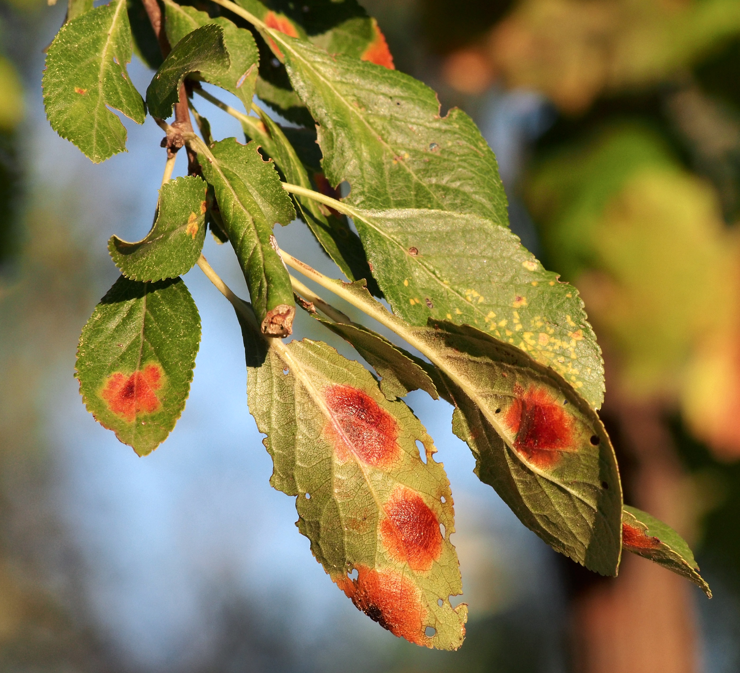 Manchas de Polystigma rubrum en hojas de ciruelo (Prunus domestica). Losar de la Vera (Cáceres, España).}